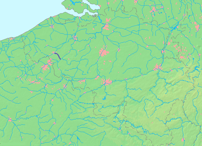 Map of the Kortrijk-Leie kanaal